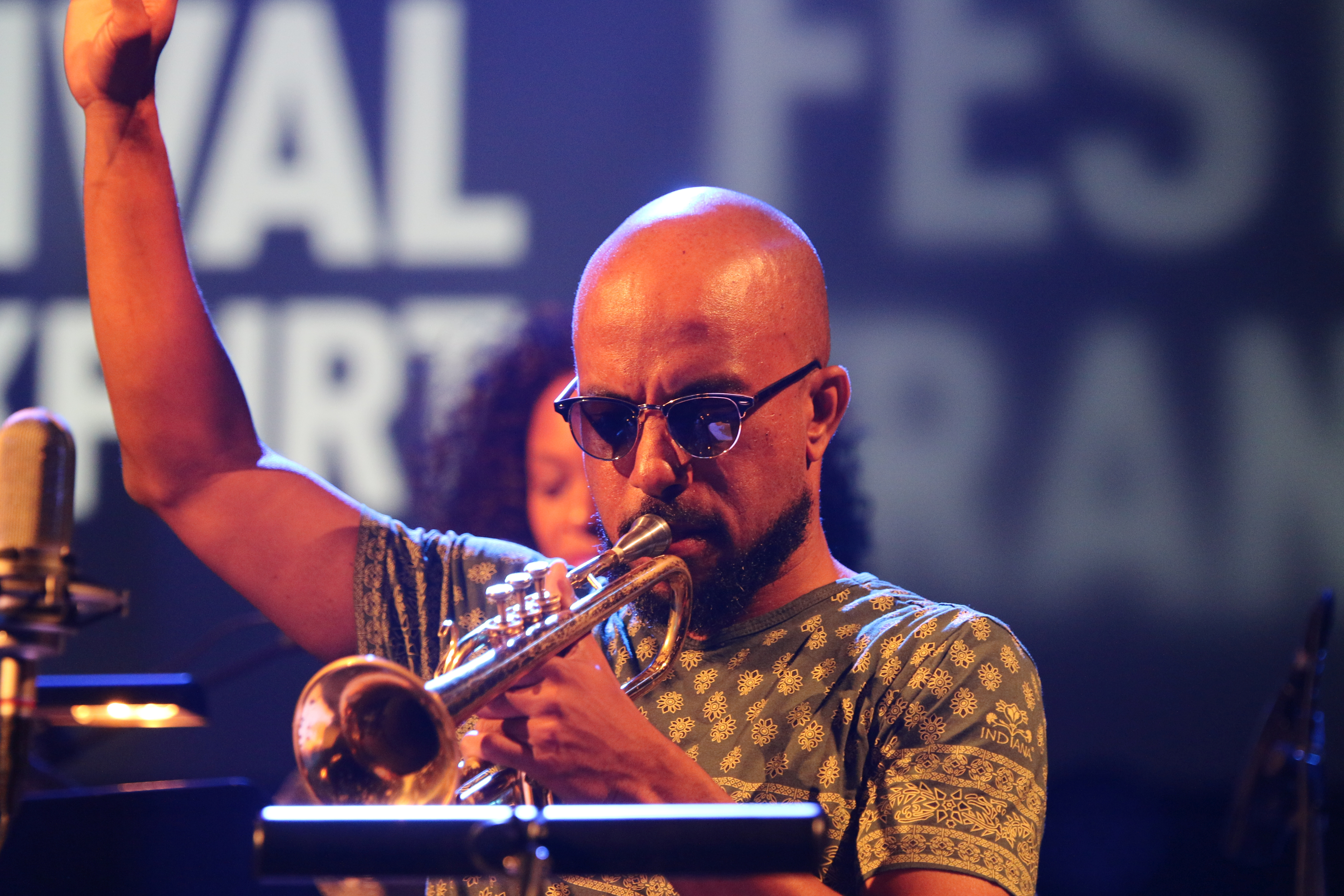 46. Deutsches Jazzfestival Frankfurt 2015: AACM Now Generation: Ben LaMar Gay